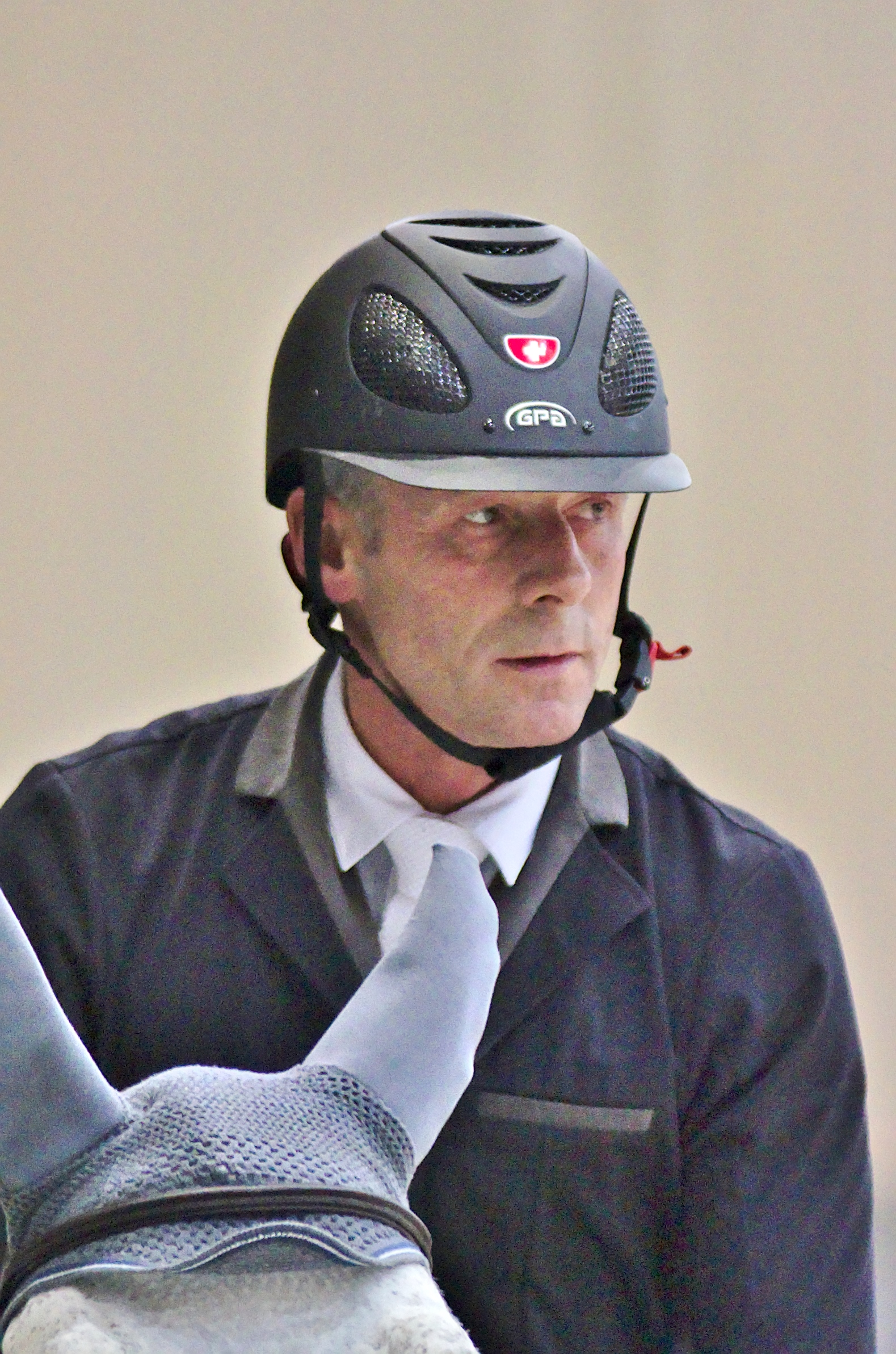 CHI Genève 2013 - 20131214 - Paul Estermann et Naiade d'Auvers